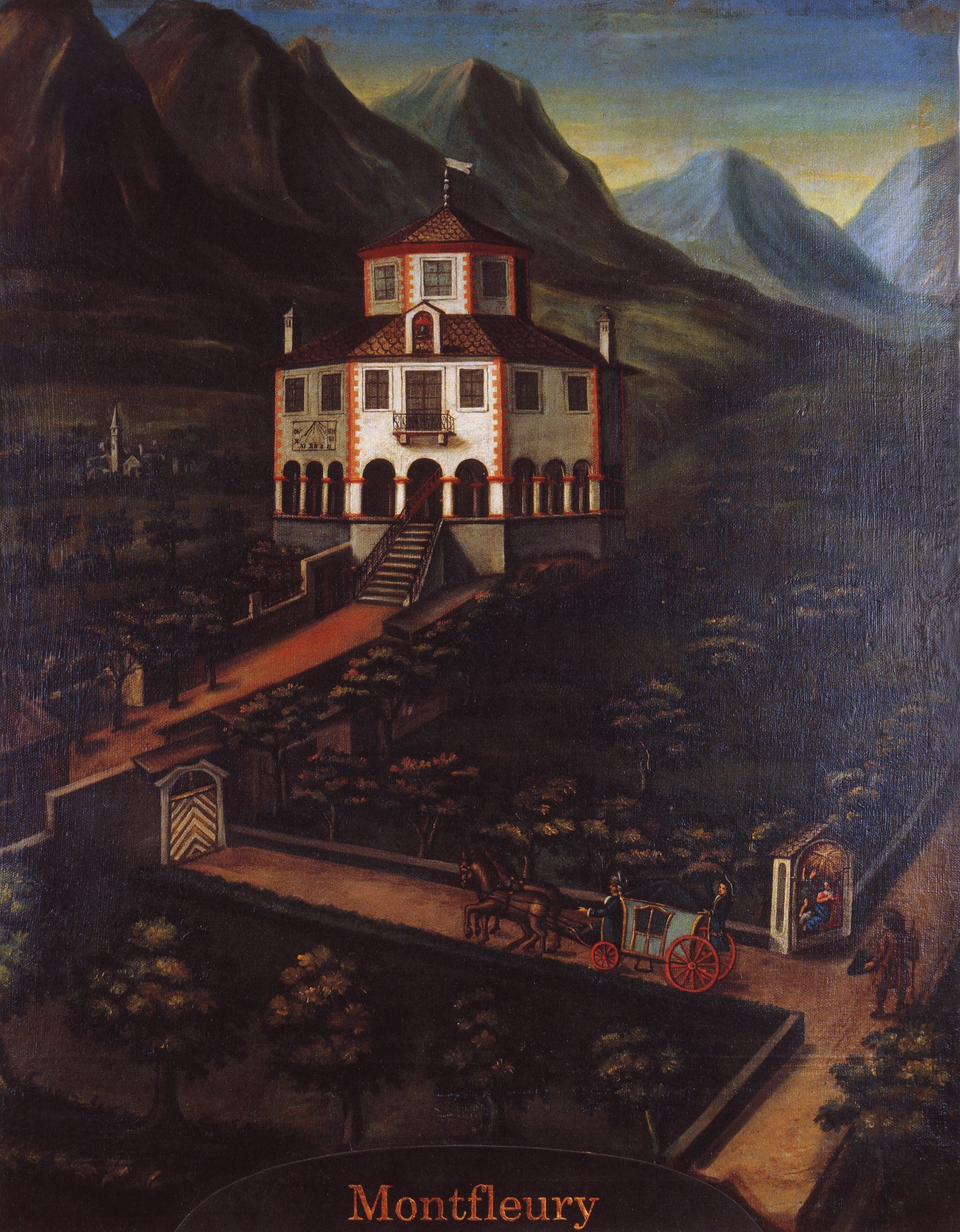 Dipinto di anonimo della fine del XVIII secolo del Castello di Montfleury, Aosta, Valle d'Aosta, Italia. Collezione Regione Autonoma Valle d'Aosta. Presenta già le modifiche volute dal proprietario Barillier.